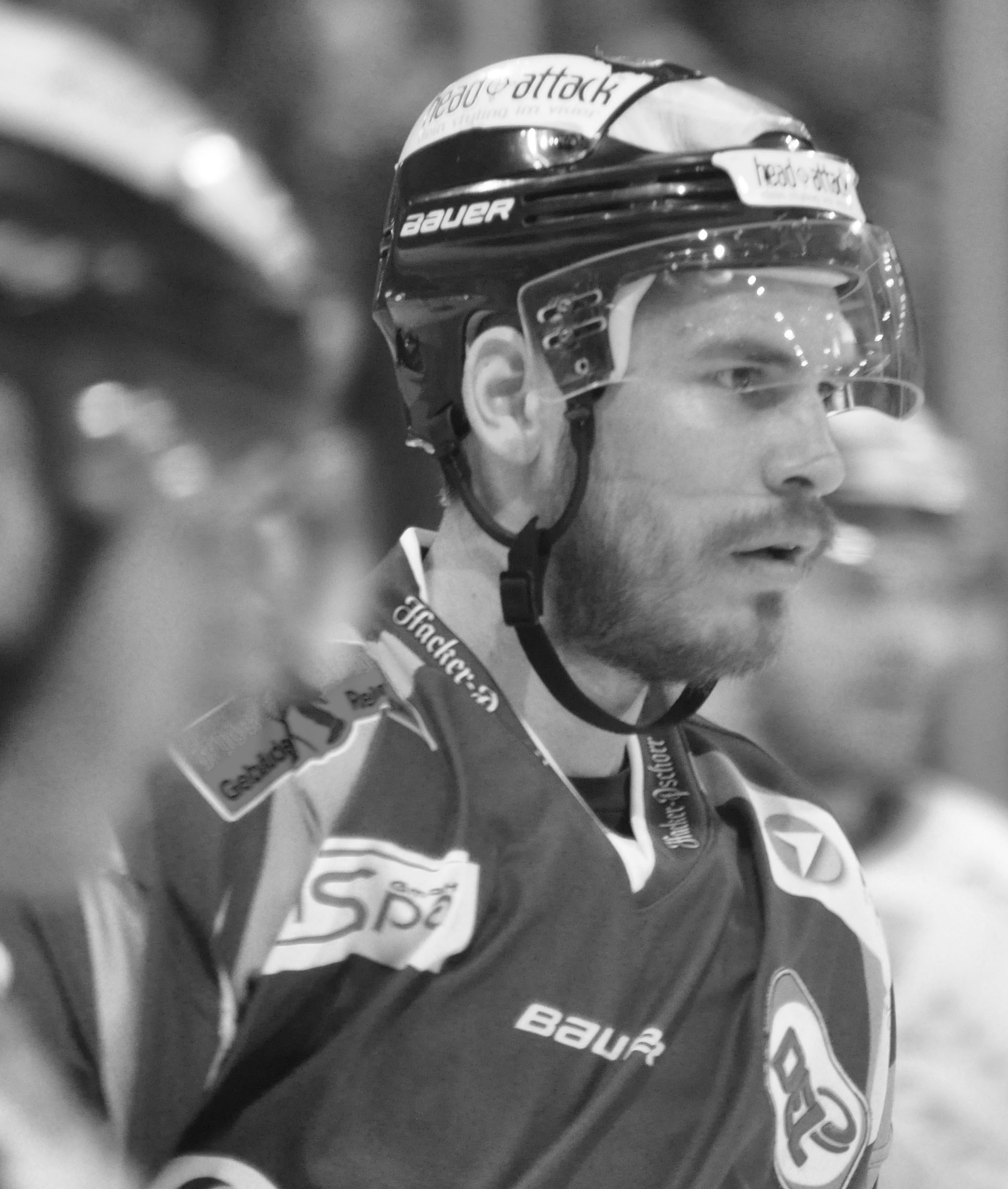 Straubing Tigers - Eisbären Berlin 11.04.2012 DEL PlayOff Halbfinale